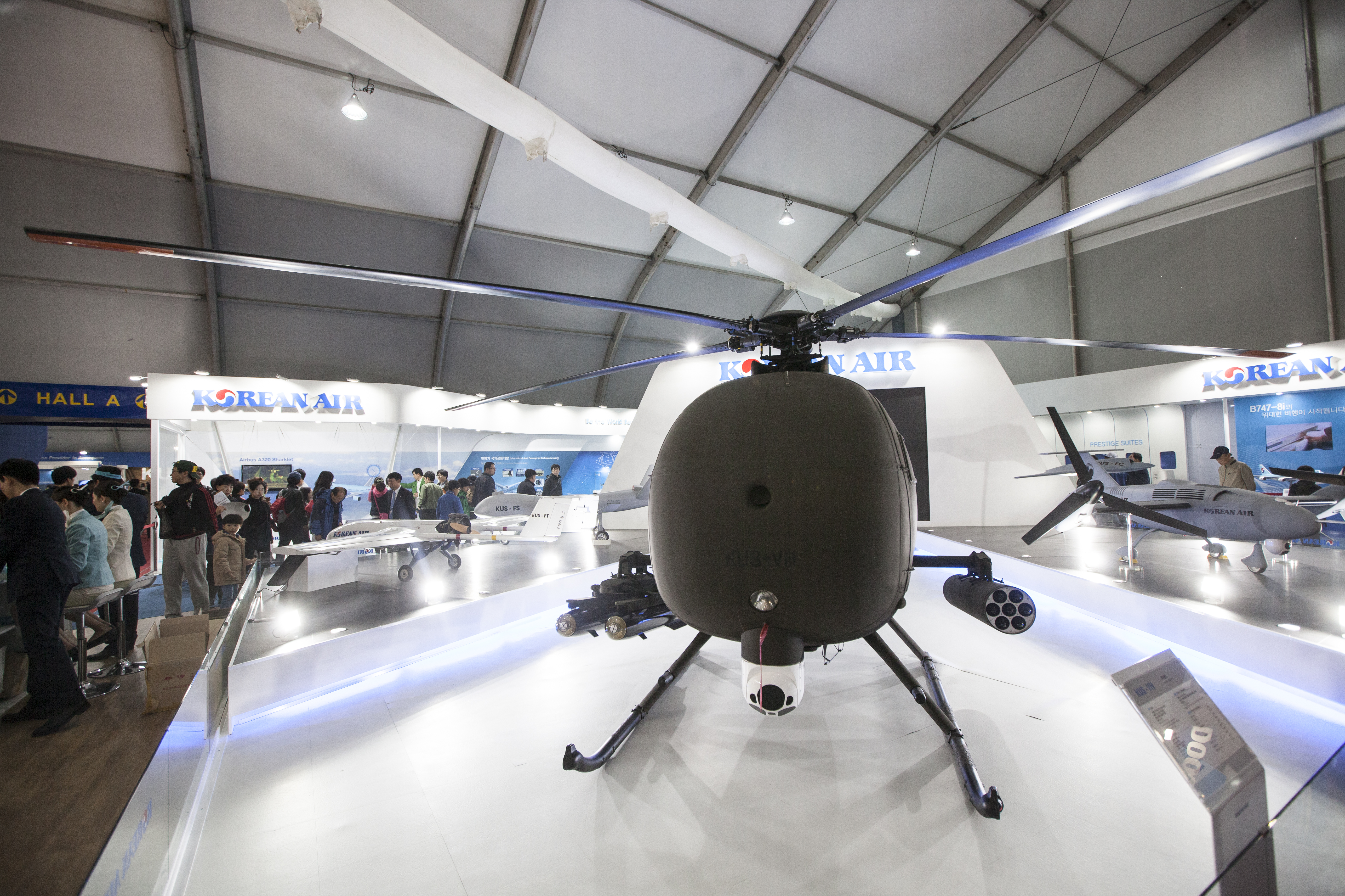 촬영 : 정승익